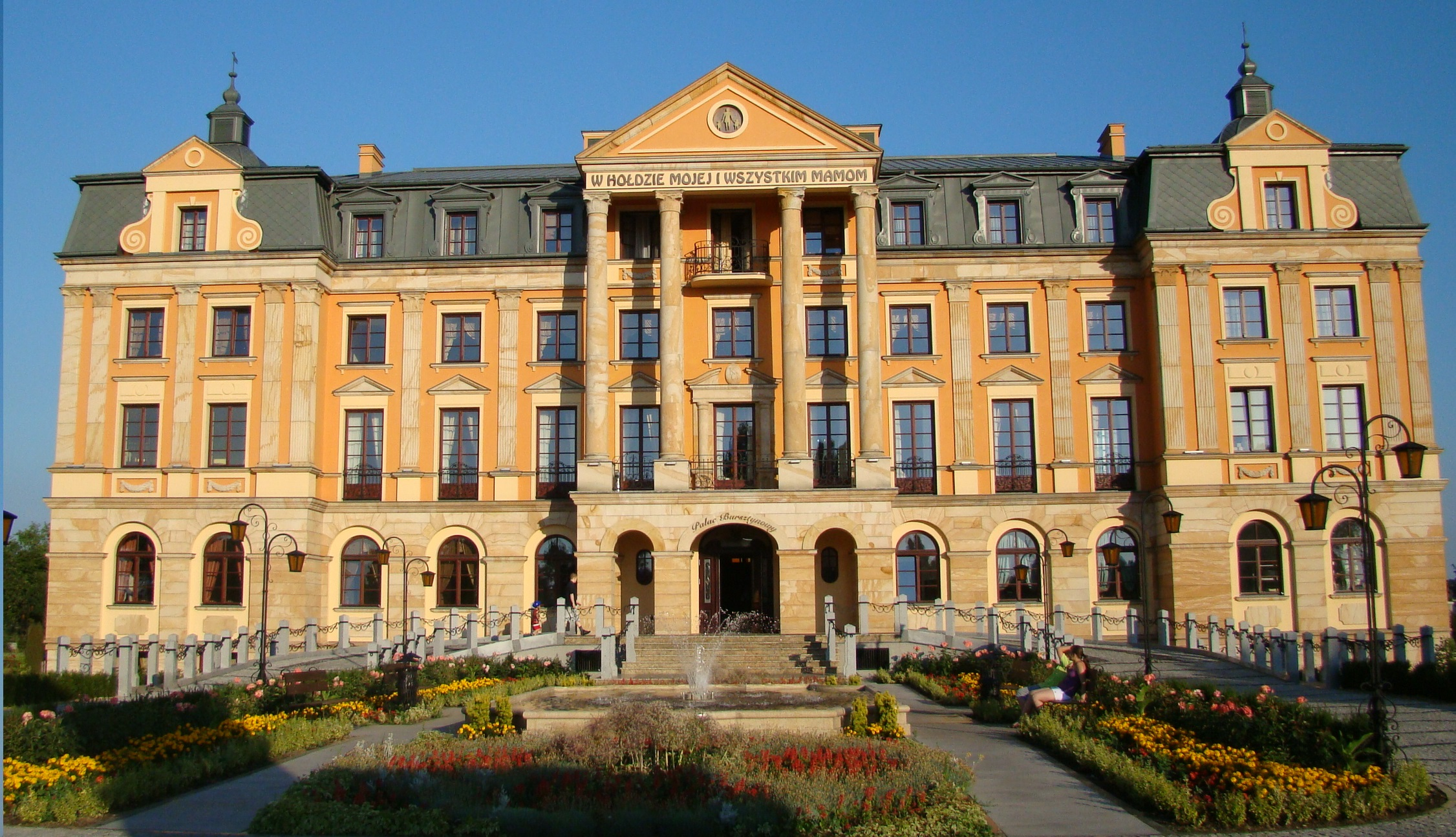 Pałac bursztynowy we Włocławku